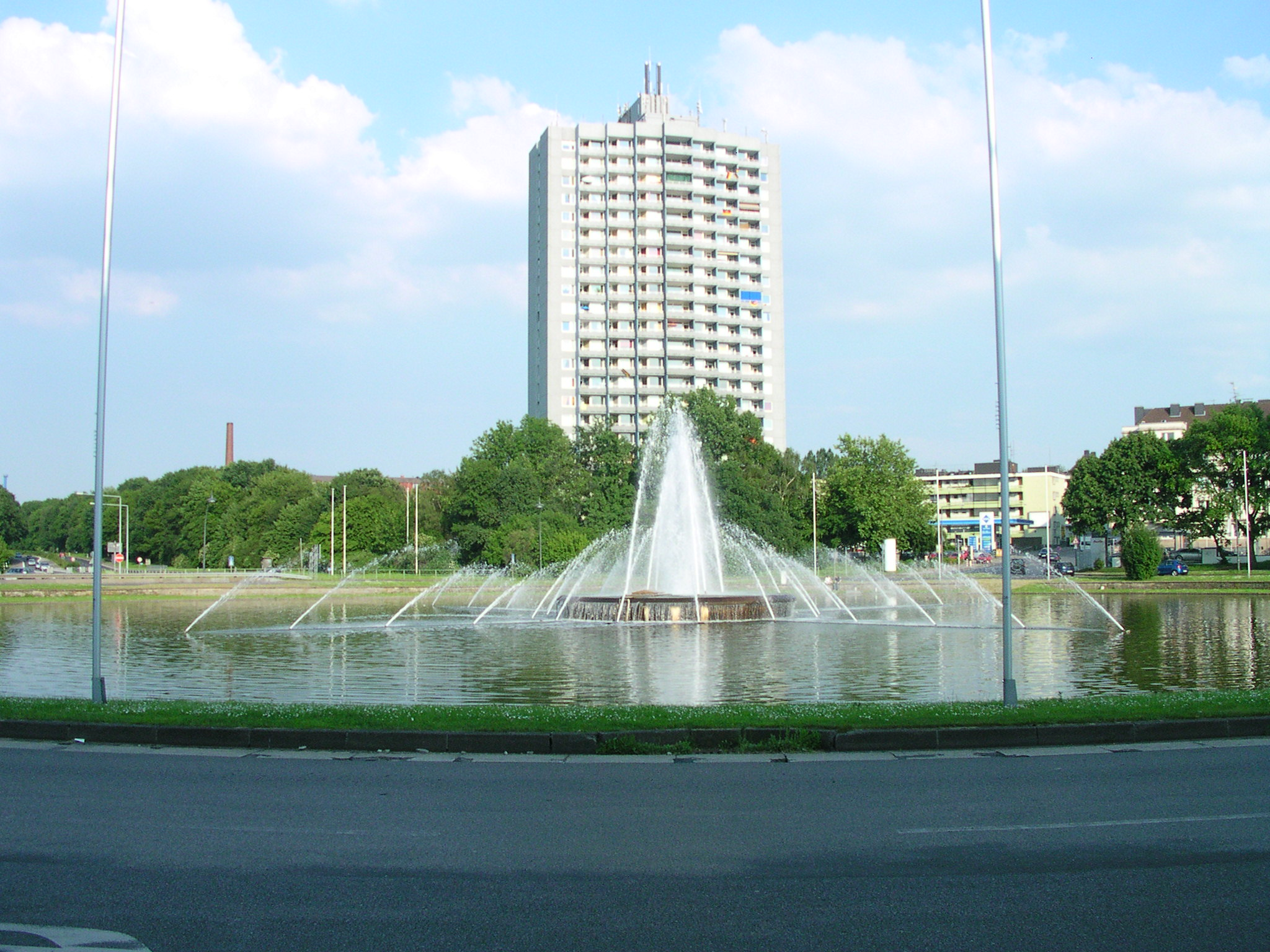 Aachen, Europaplatz, gegenüber das früher so genannte "Iduna-Hochhaus"